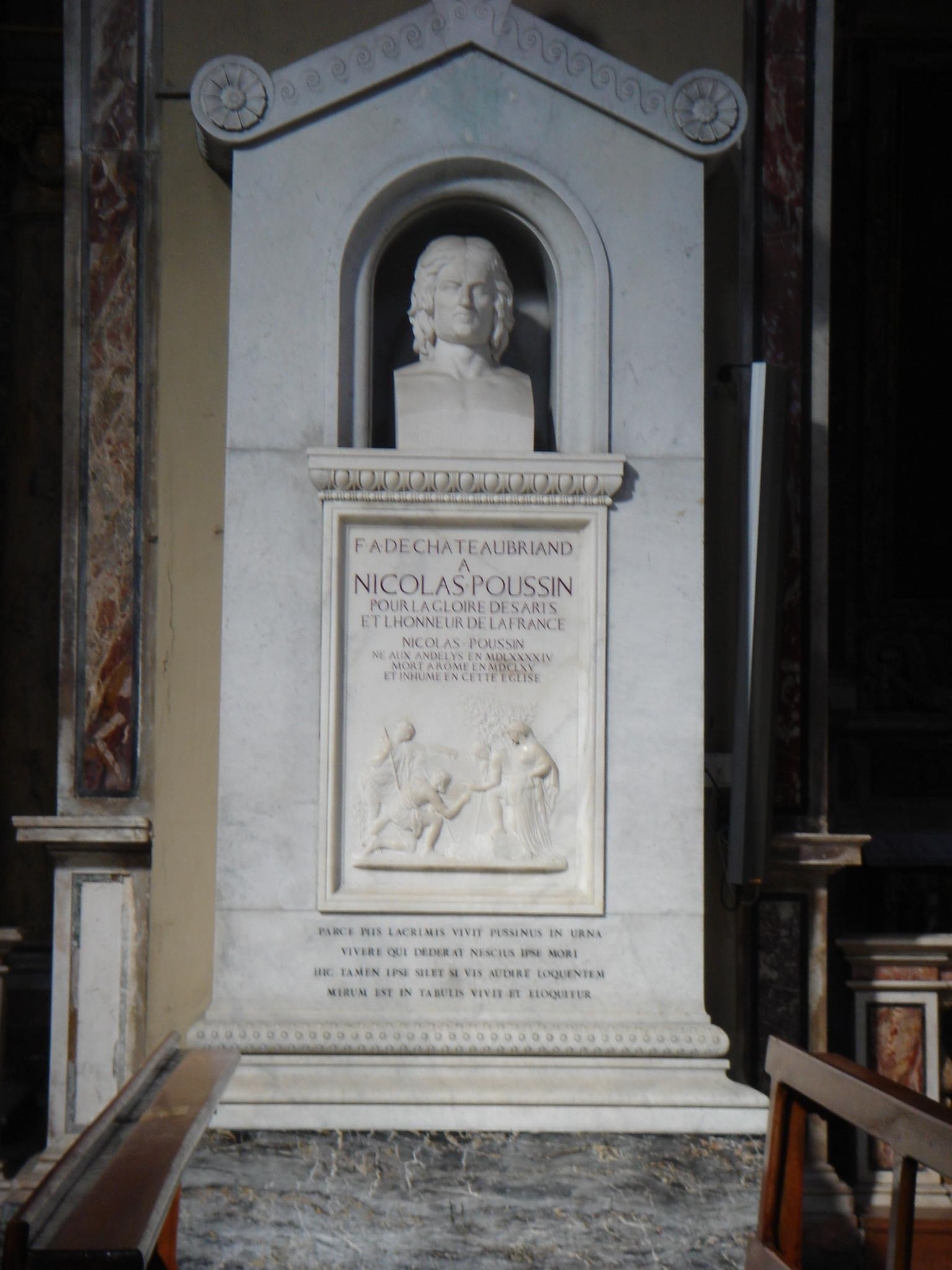 Rome, San Lorenzo in Lucina: la tombe de Nicolas Poussin : « F. A. de Chateaubriand, à Nicolas Poussin, pour la gloire des arts et l'honneur de la France, Nicolas Poussin, né aux Andelys en MDLXXXXIV, mort à Rome en MDCLXV, et inhumé en cette église ».